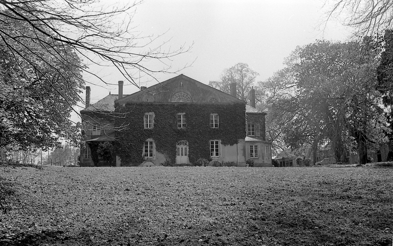 Photographie de la façade arrière du château de la Touraille publiée en ligne par l'inventaire du patrimoine.